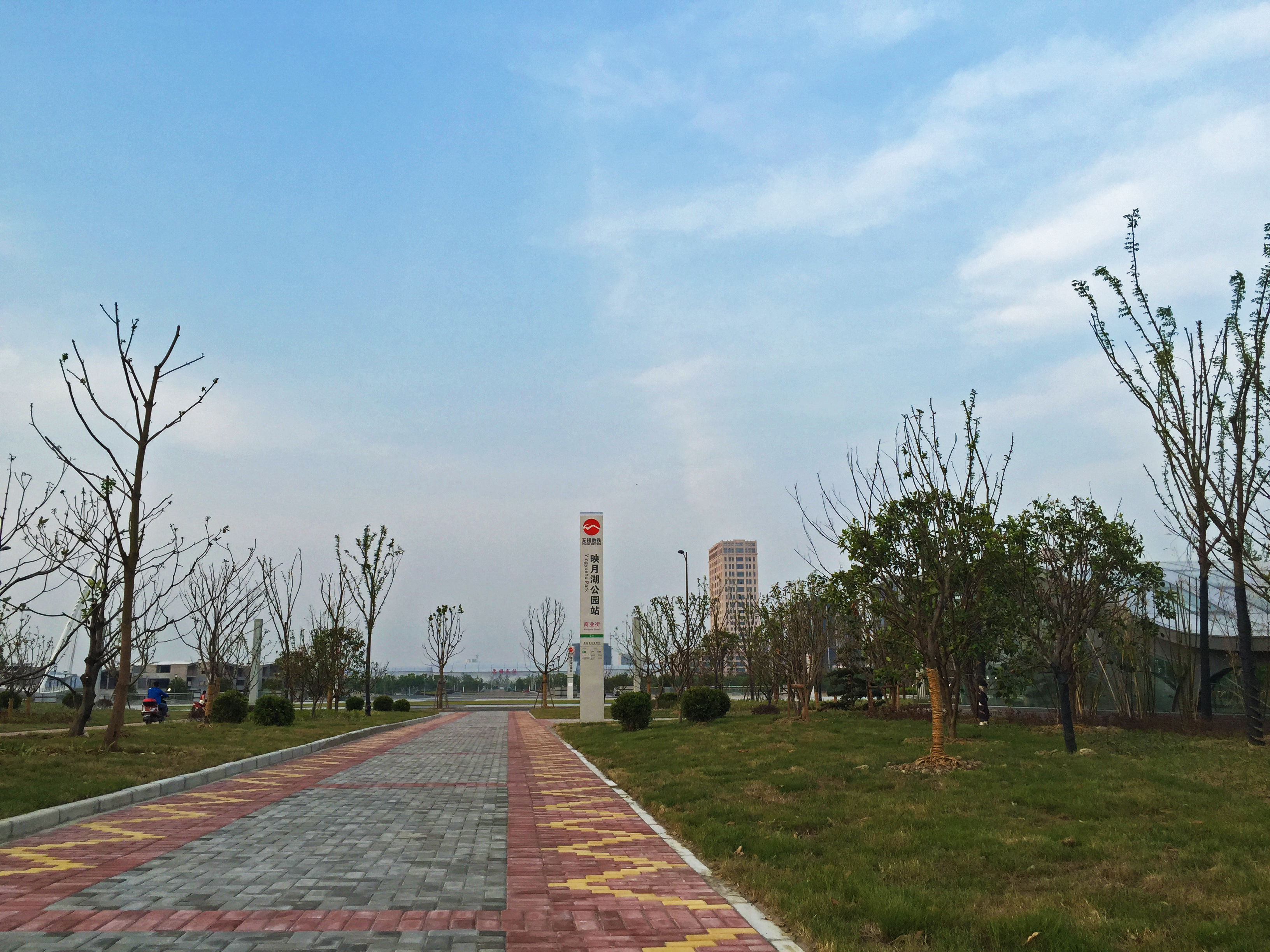 無錫地鐵映月湖公園4號口附近